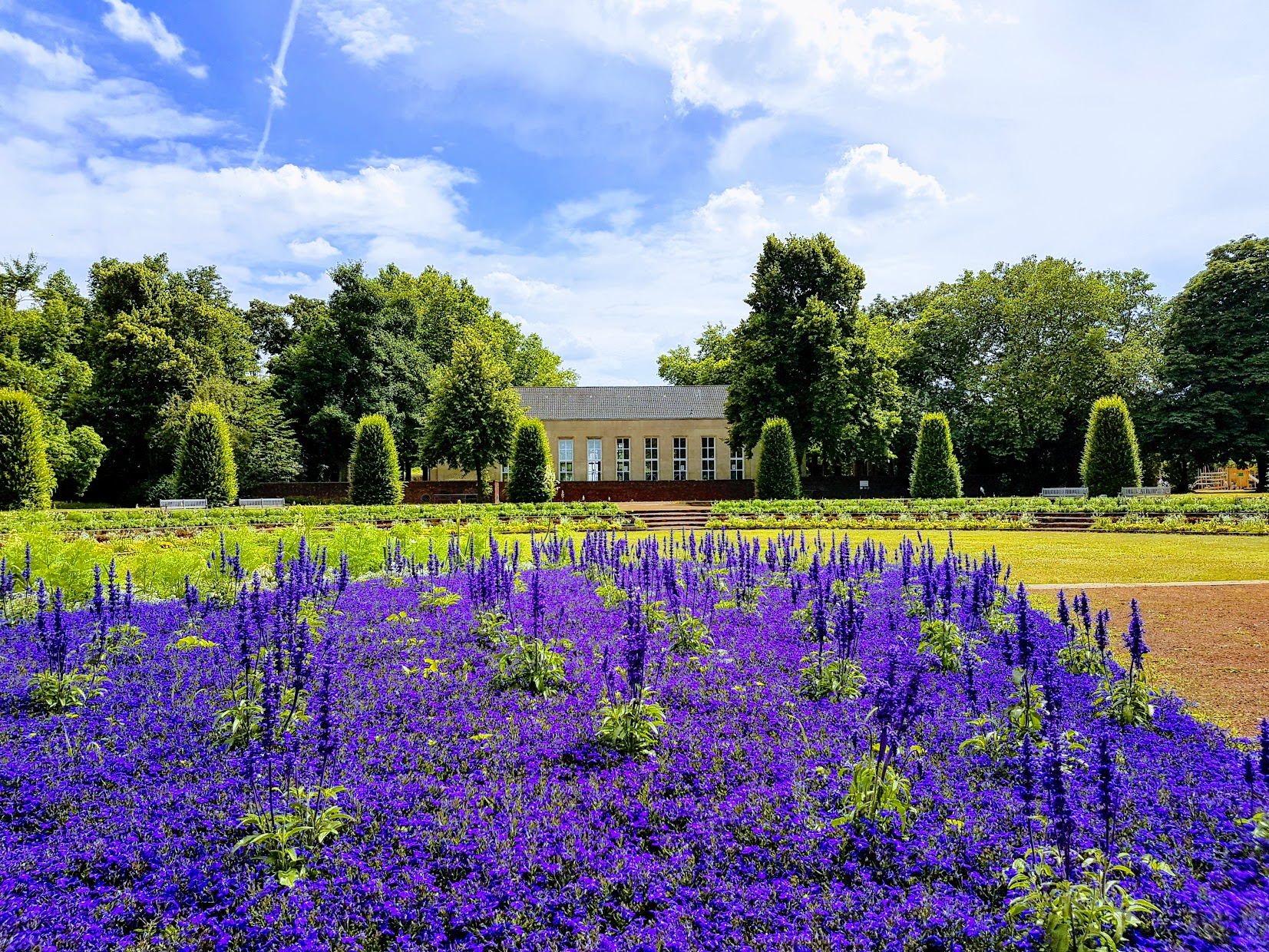 Kreisförmiges Blumenbeet (ehemaliger Tanzring) auf der Rückseite der Ausstellungshalle im Nordpark Düsseldorf